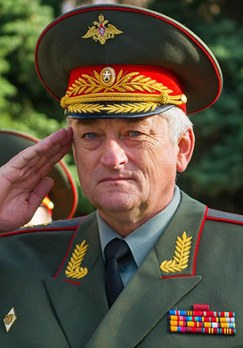 Начальник Военной академии Генерального штаба Вооружённых сил Российской Федерации генерал-полковник Владимир Борисович Зарудницкий